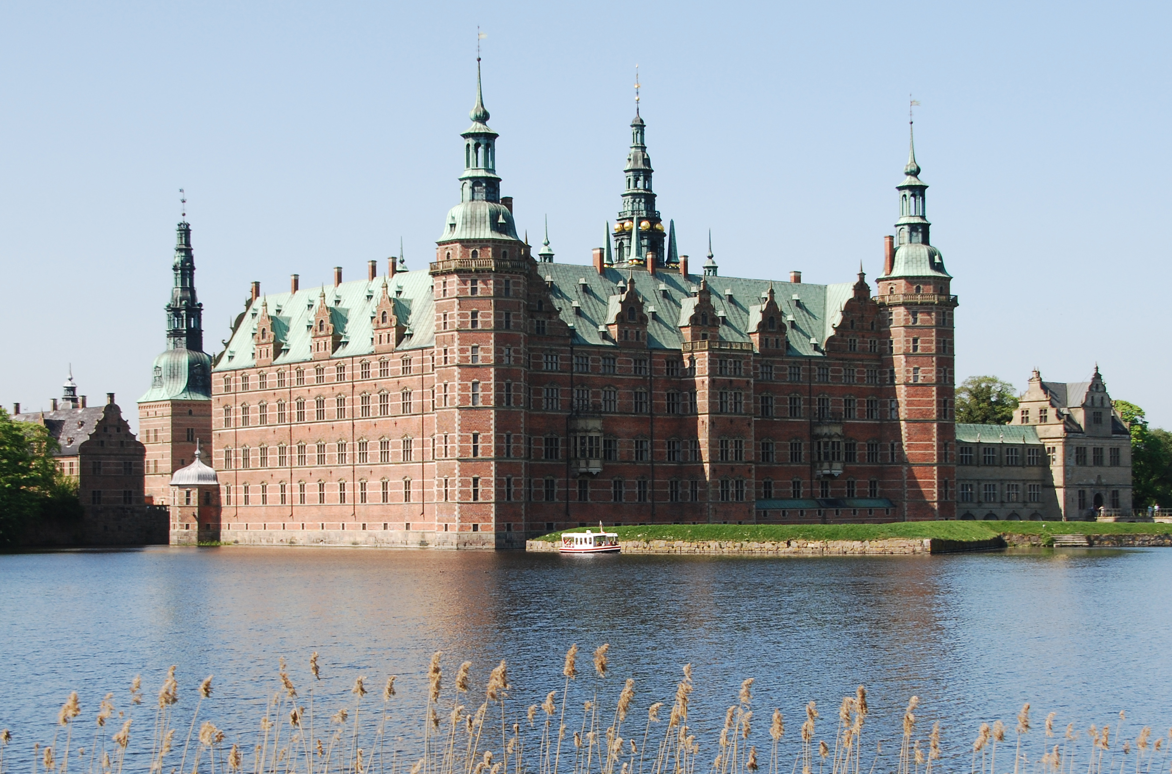 Frederiksborg Castle in Hillerød, Denmark